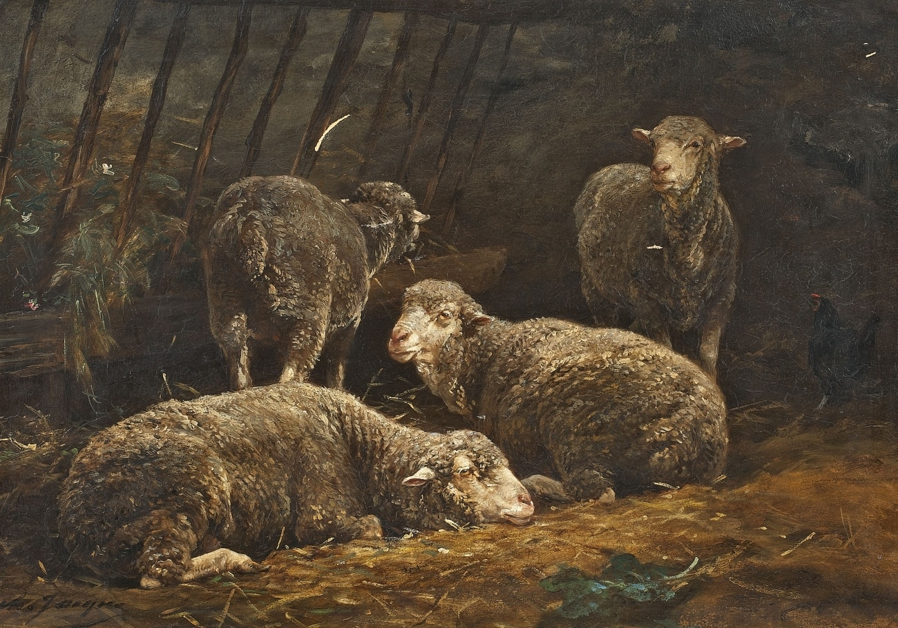 Schafe im Stall.